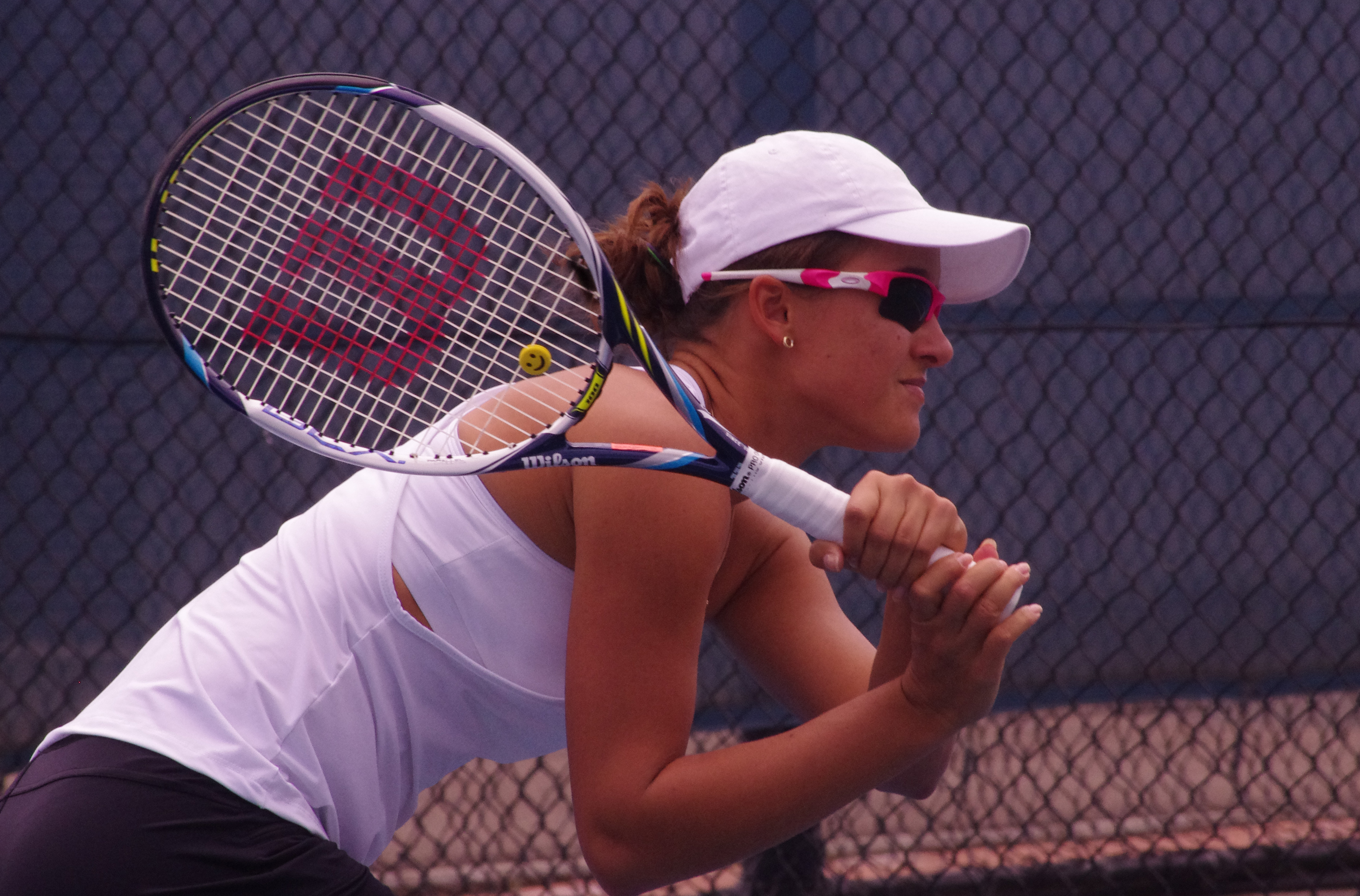 ARINA RODIONOVA